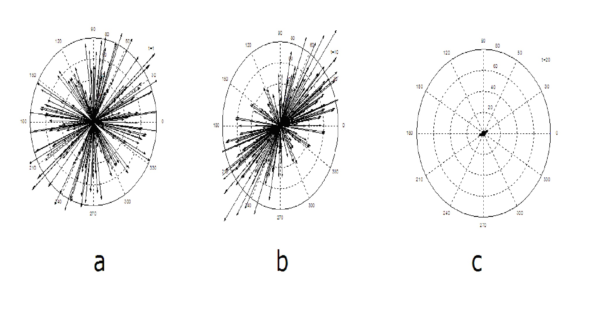 Aplicação de algoritmo genético, campo vetorial, coordenadas polares[1]